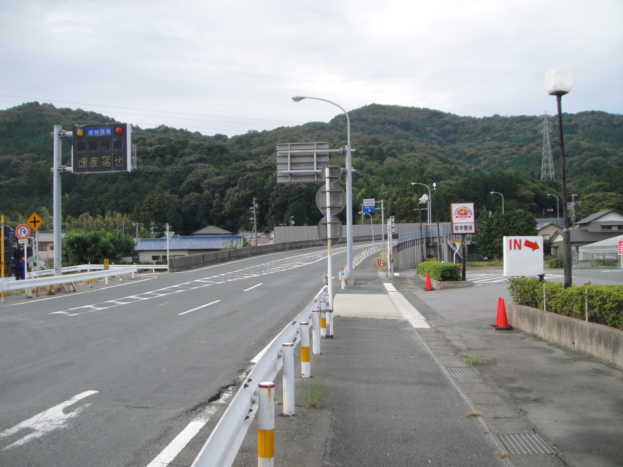 音羽蒲郡有料道路の終点。国道1号付近。